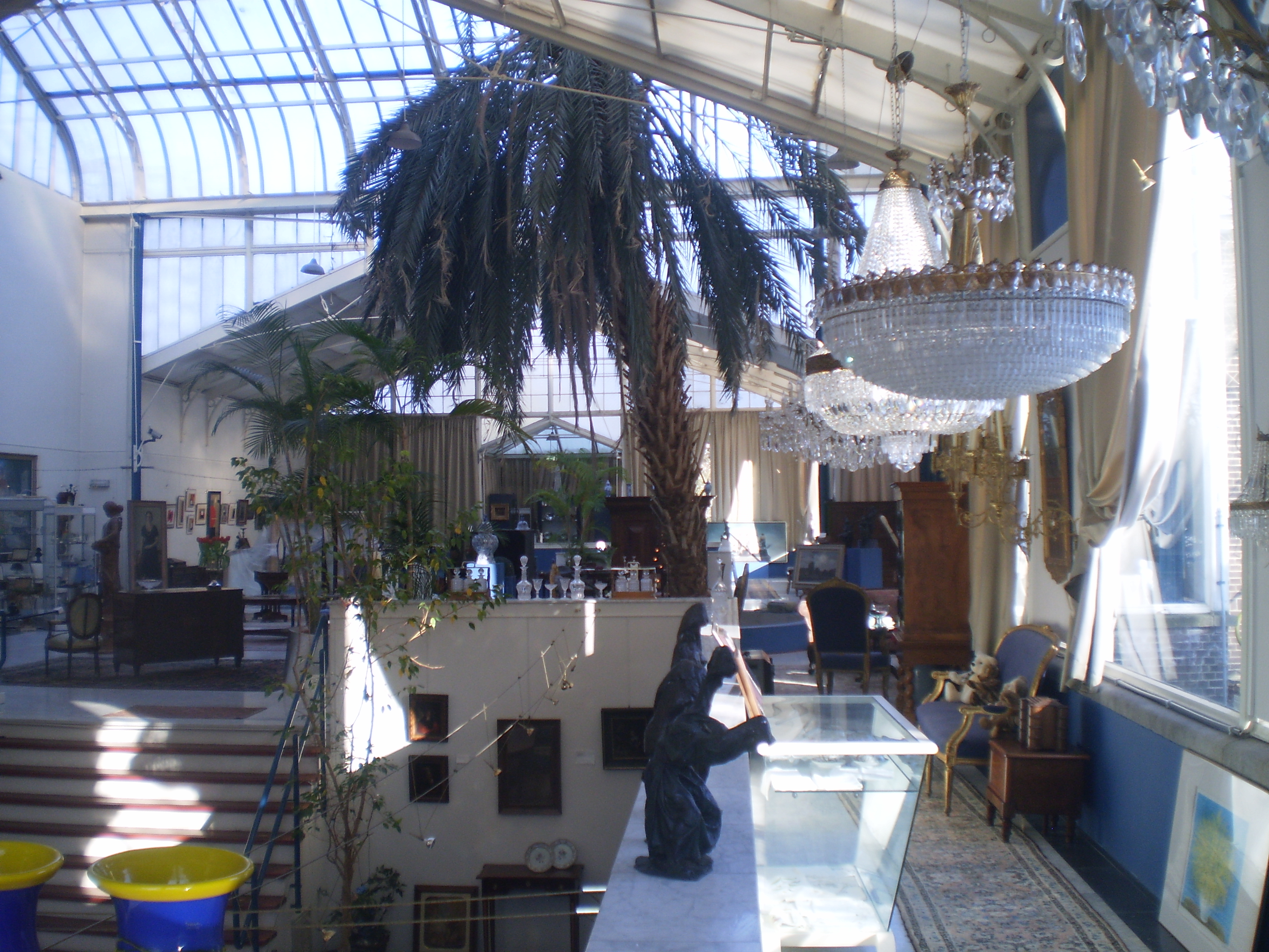 Wintertún Cantonspark keunsthannel